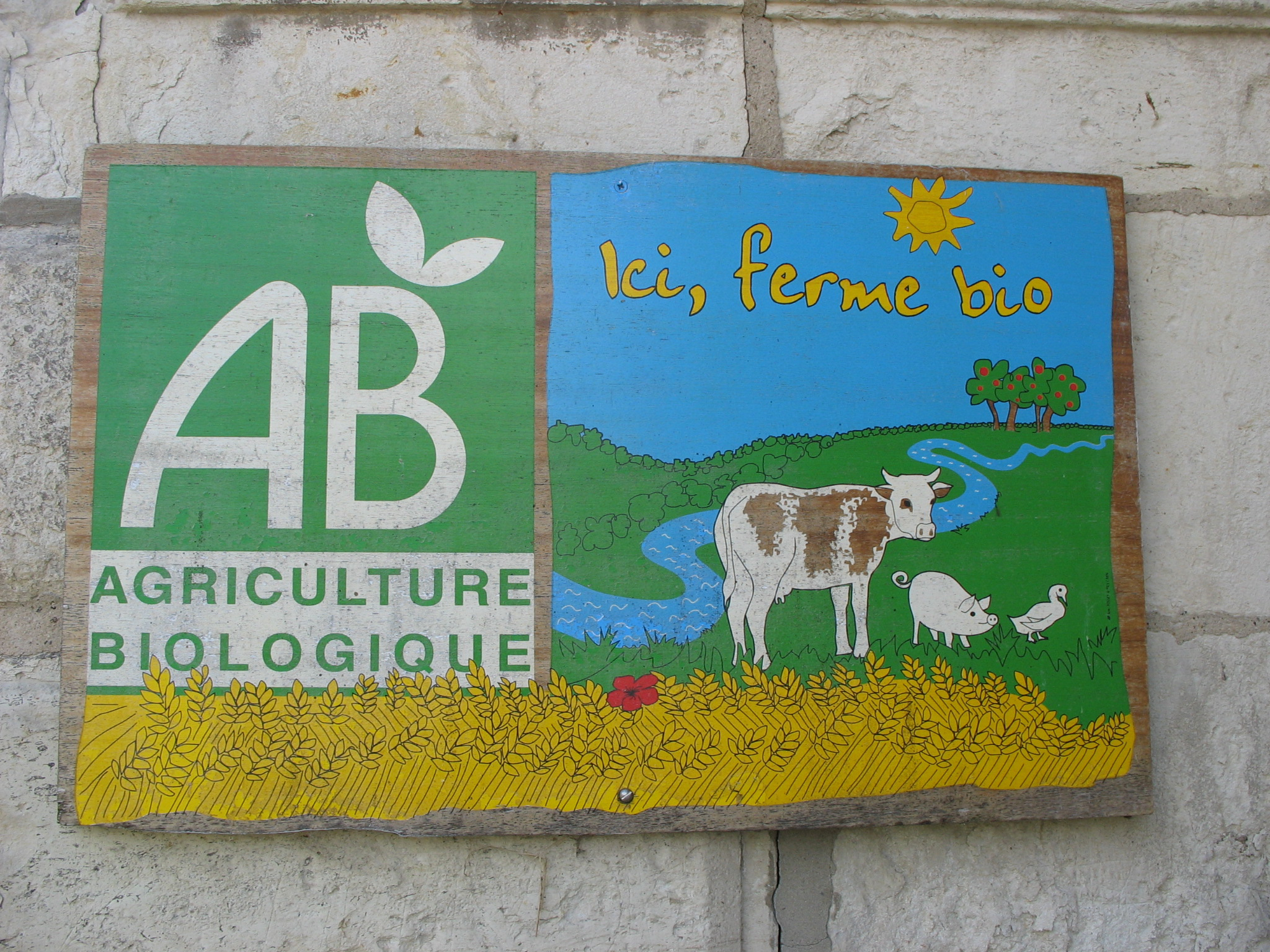 AB